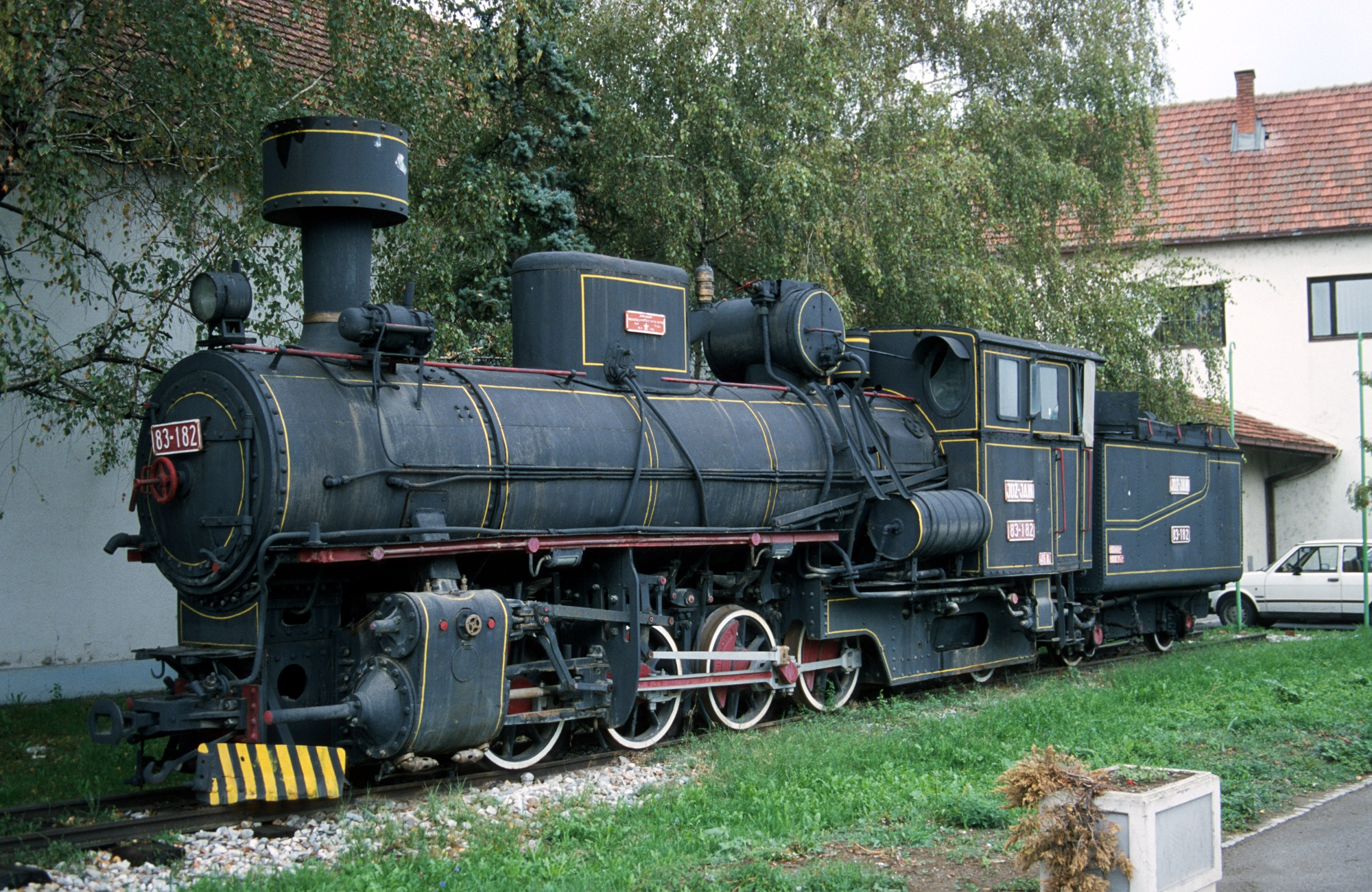 en: Former Yugoslavian States Railway JDŽ 83-182 on plinth in Lajkovac, Serbia. de: Jugoslawische Staatsbahnen JDŽ 83-182 als Denkmal in Lajkovac, Serbien